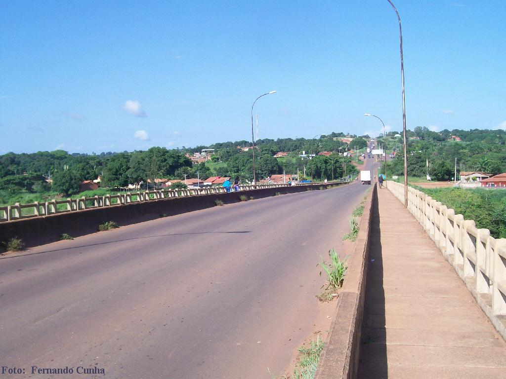 Ponte Juscelino Kubstichek sobre o rio Tocantins. Aguiarnópolis estado do Tocantins, Brasil.